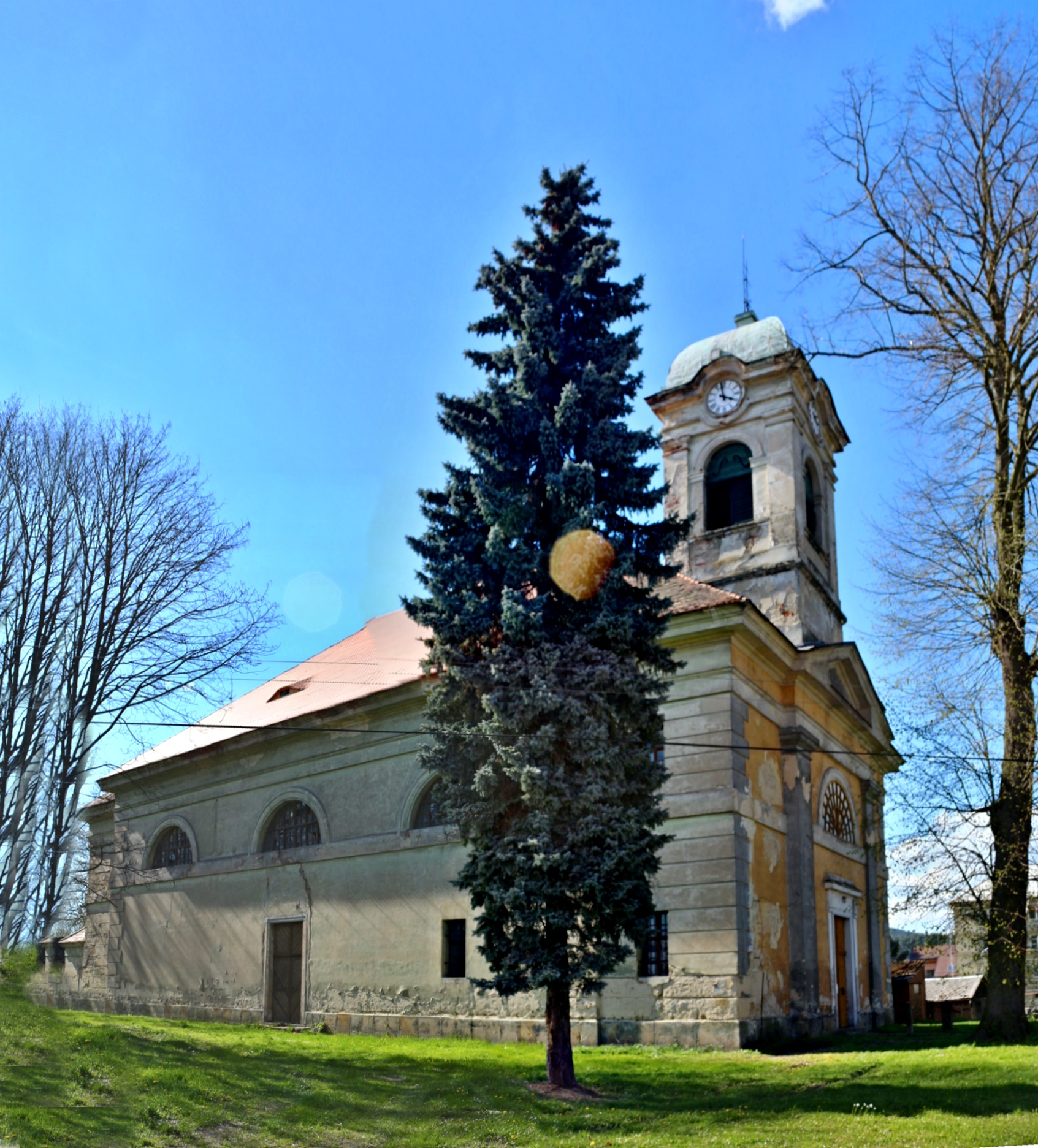 Kostel Povýšení sv. Kříže ve Cvikově